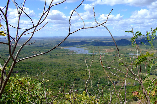 Município de Martins, no Rio Grande do Norte, Brasil.